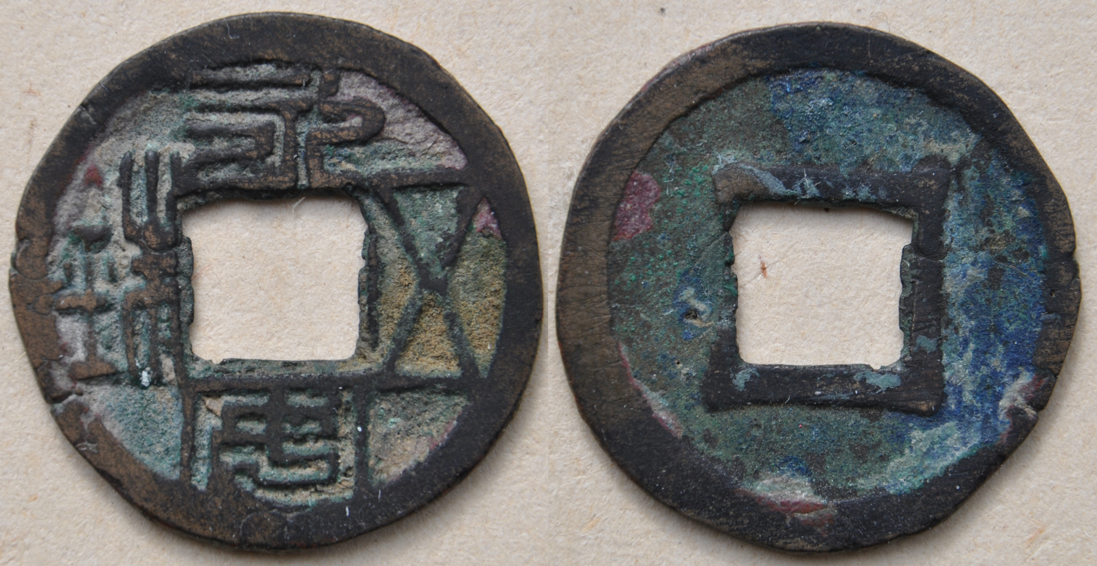 S277 : A/ Yong An wuzhu (wuzhu de l'ère Yong An) R/ vide Dimension : 23 mm Poids : 2.4 g. Bronze Monnaie de la dynastie des Wei du Nord, empereur Xiaozhuangdi (528-530) La monnaie a peut-être été un peu rognée.